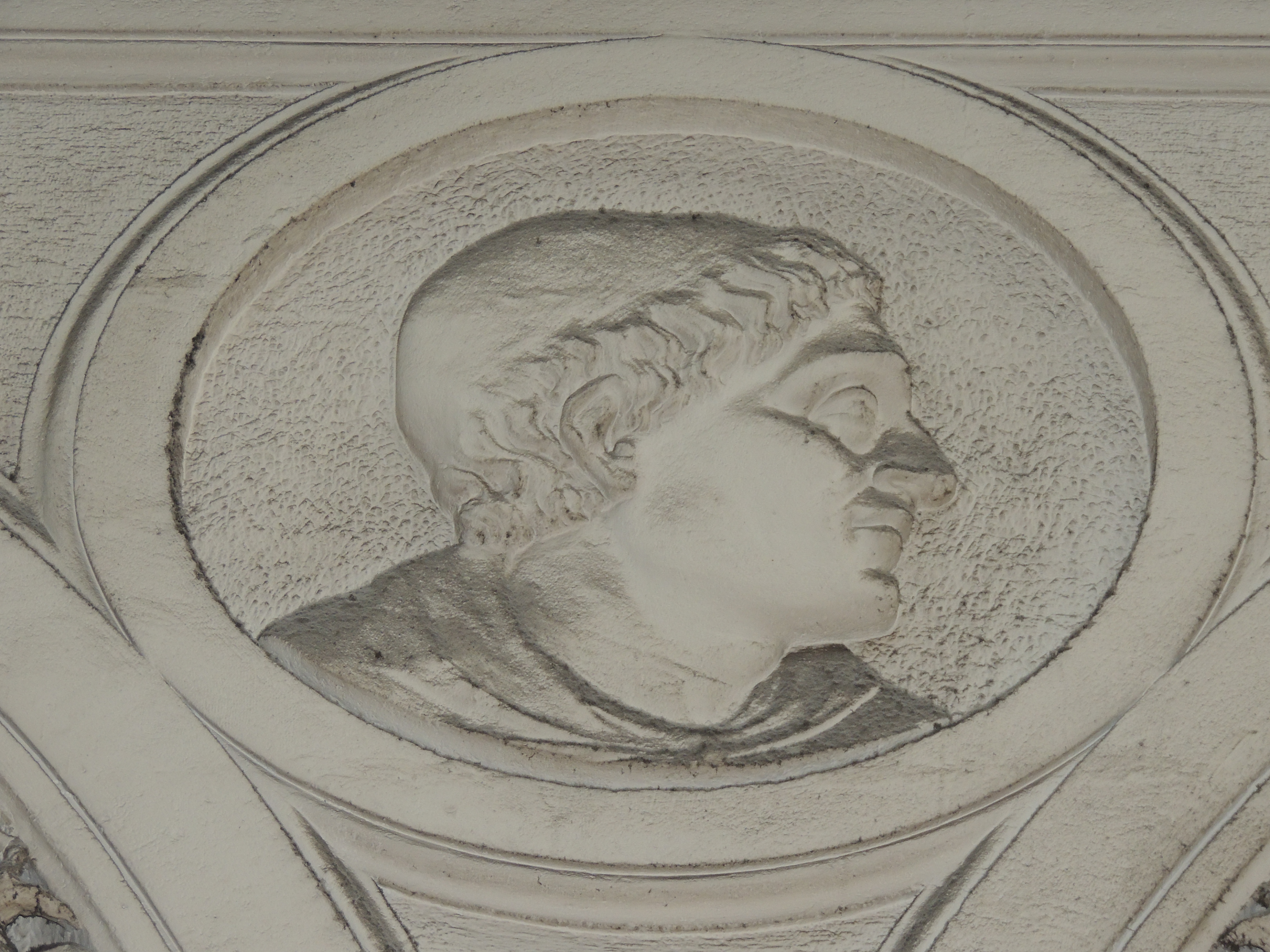 Passage Pommeraye, Nantes, France - Médaillon de la galerie Santeuil (côté est, le deuxième en partant du nord)